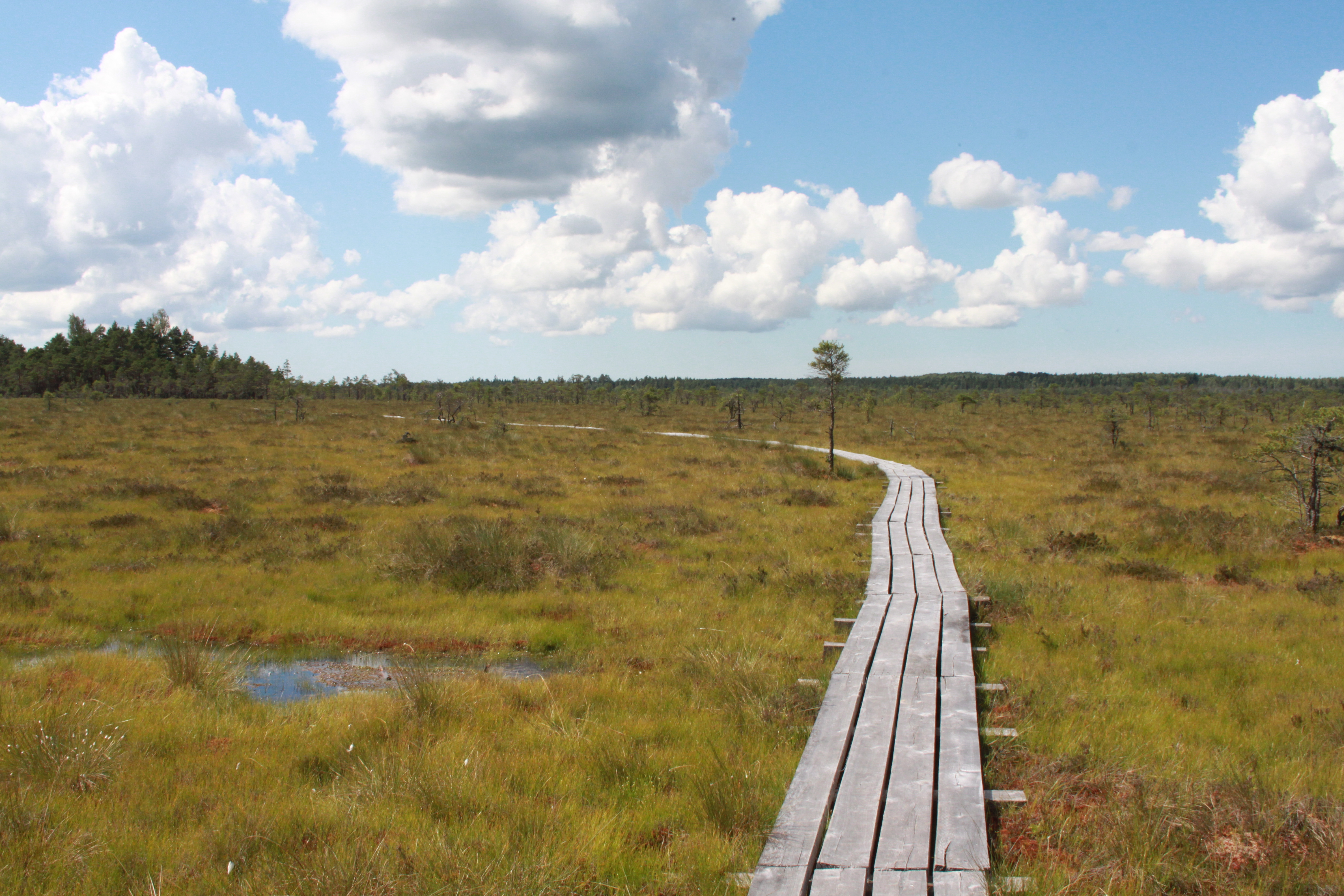 Laipa Dunikas purvā (Tīrspurvā)